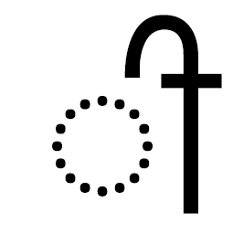 Бихари (гурмукхи)